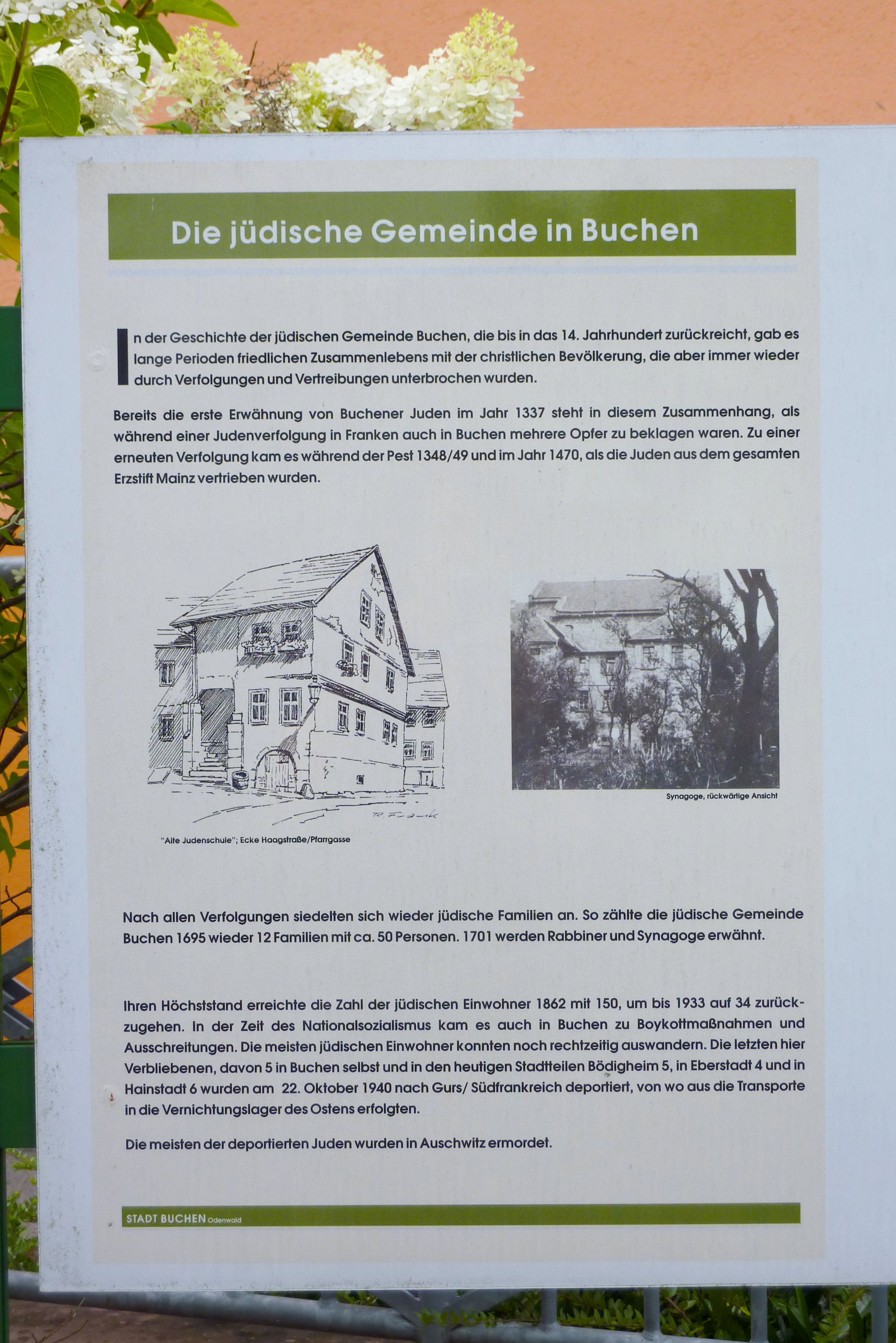 Mahnmal am Platz der ehemaligen Synagoge in Buchen (Odenwald) im Neckar-Odenwald-Kreis (Baden-Württemberg, Deutschland)